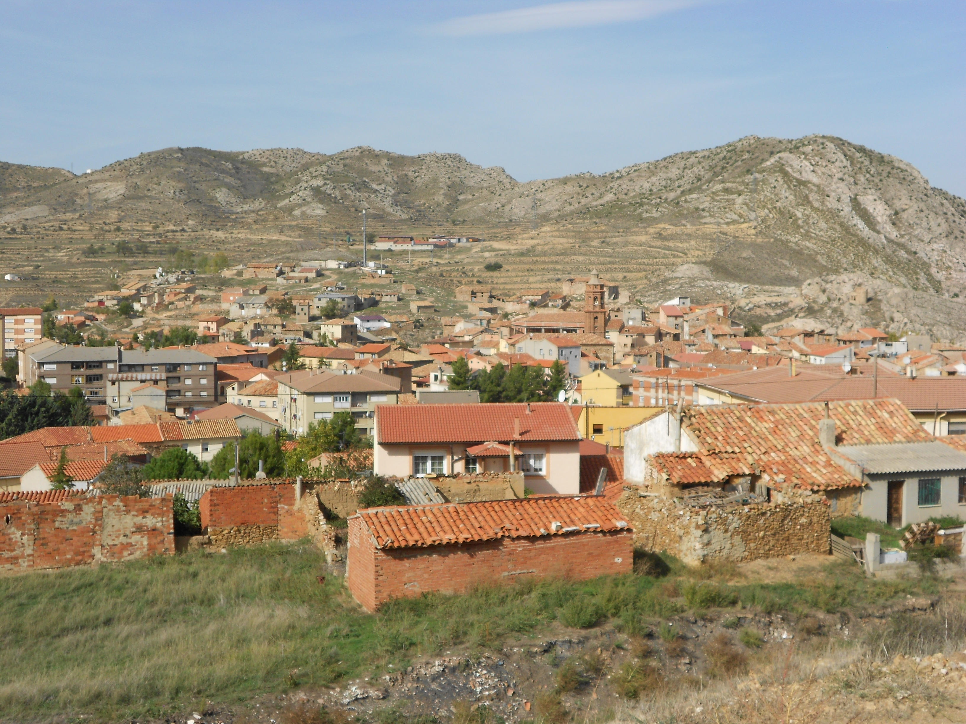 Panorámica de Utrillas (Aragón, España)